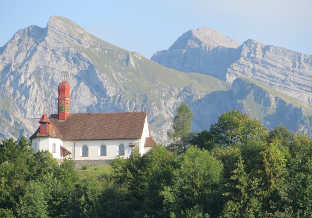 Ansicht der Flüeli-Kapelle in Flüeli-Ranft von Norden, im Hintergrund das Nünalphorn und der Huetstock.